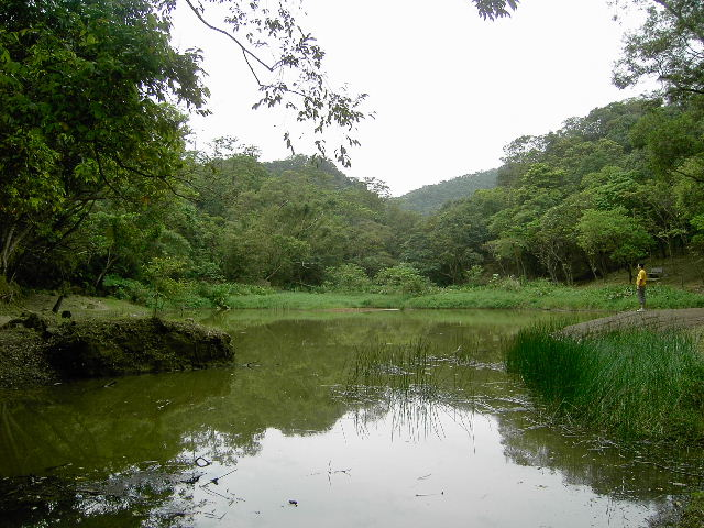 台北縣汐止市（今新北市汐止區）翠湖。在翠湖湖畔瀏覽湖光景色，天上飛行雲朵倒影成了湖面的光采。